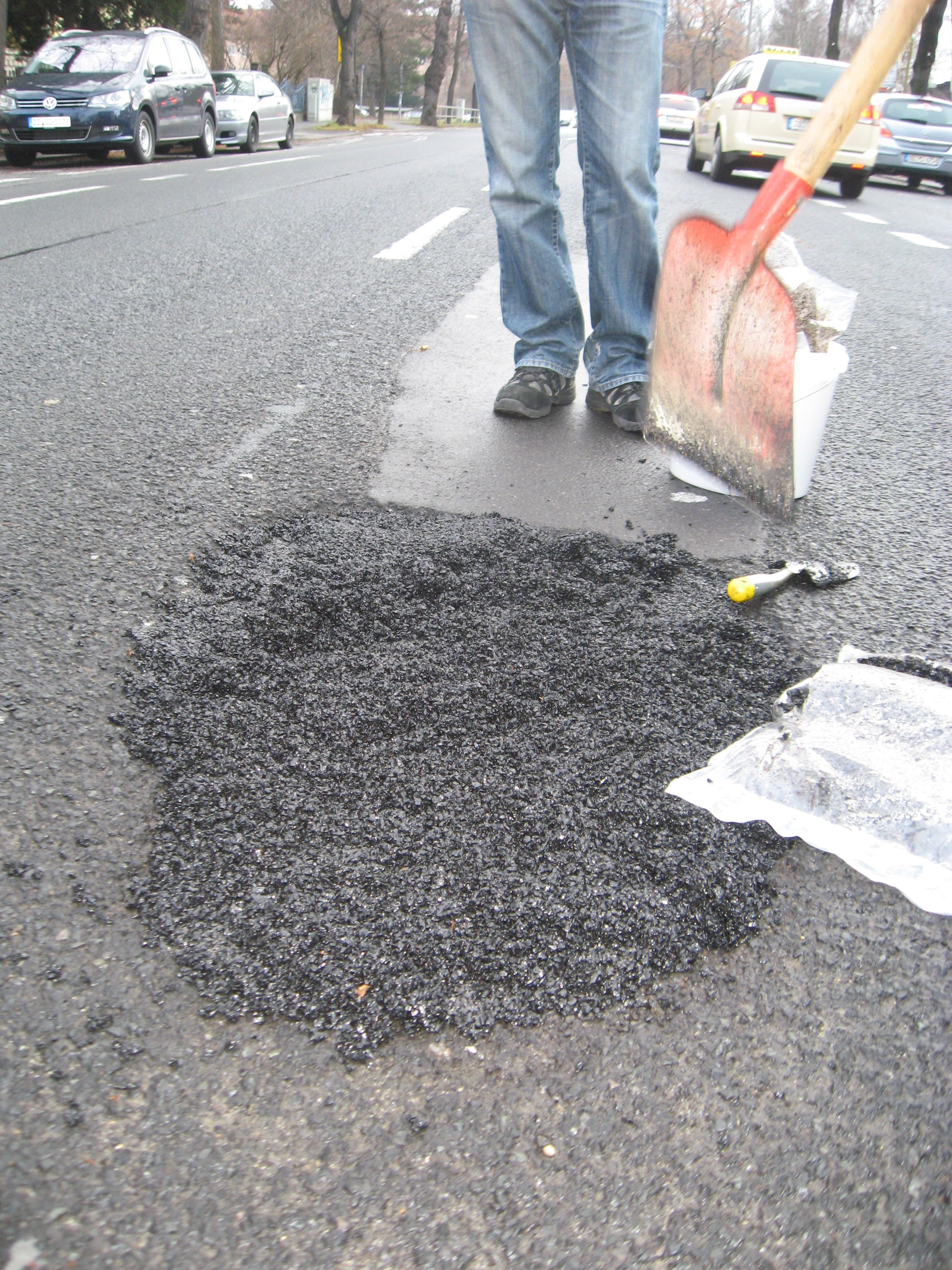 Einbau mit Kaltasphalt (hier: Beispielhaft mit Kaugummiasphalt)